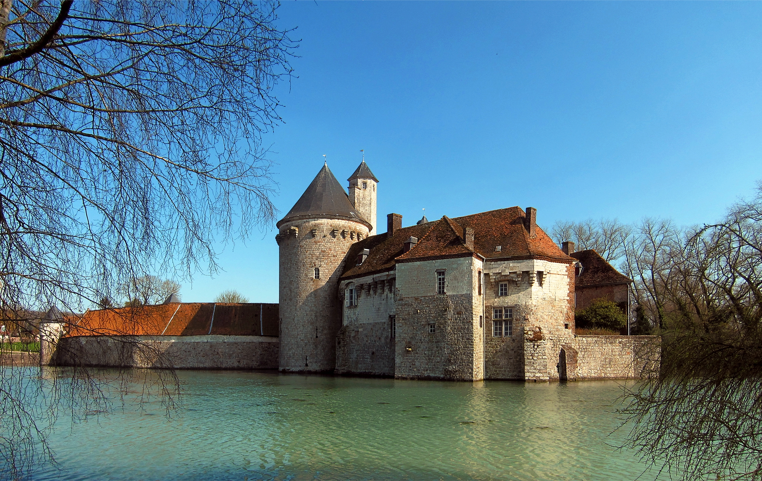 Vue latérale du Château d'Olhain.